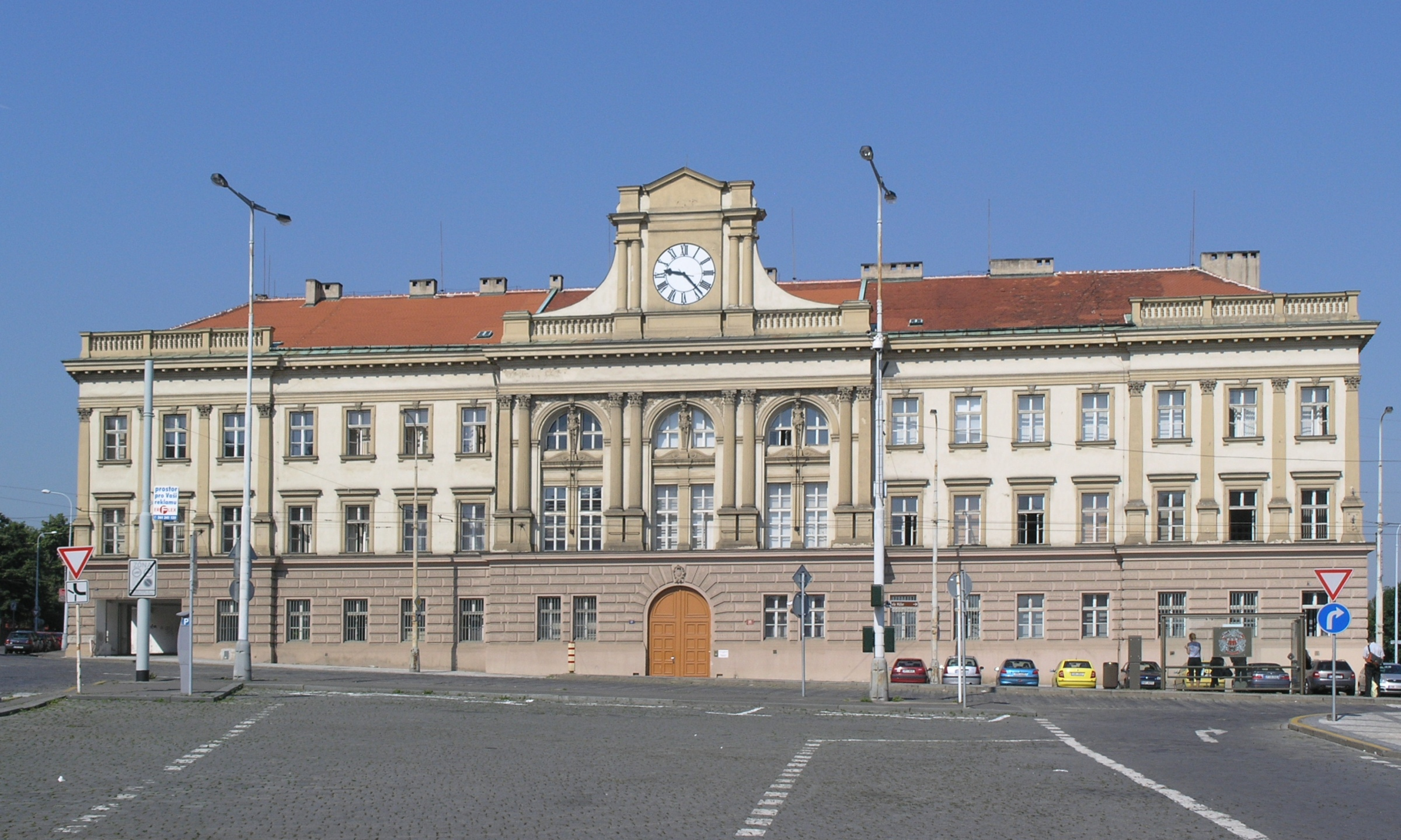 Praha, Hradčany - kasárna na Pohořelci